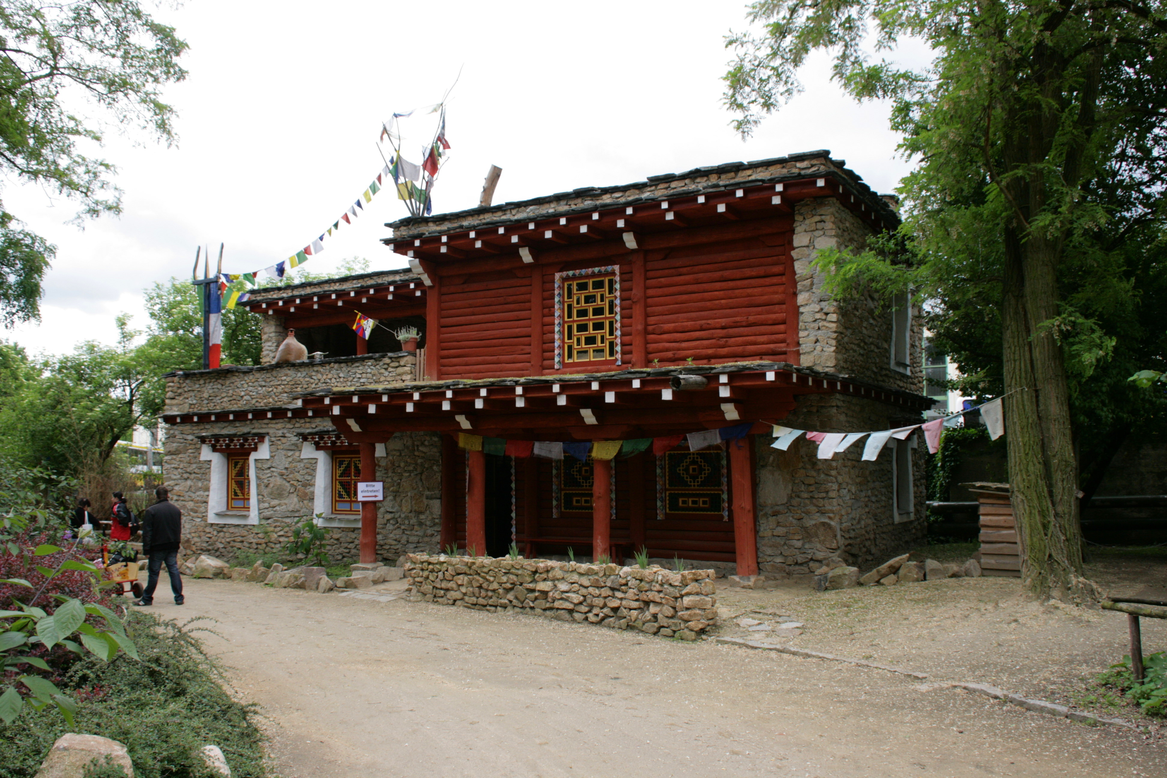 Tierpark in Görlitz